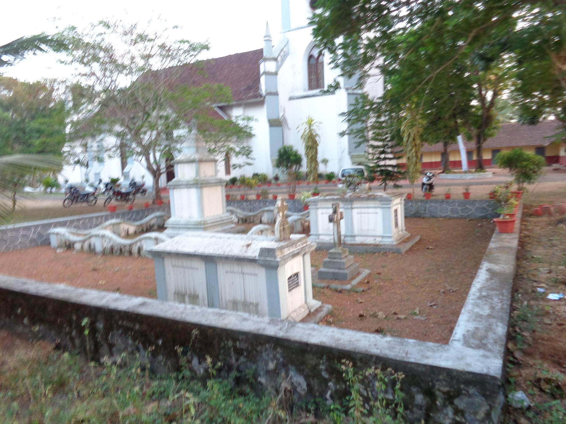 ക്രൈസ്റ്റ് ചർച്ച് മാവേലികര പീറ്റ്സായ്വിന്റെ ശവകുടീരം